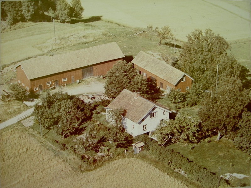 Inscannat flygfoto från juli 1960, ägare Erling Olsson. För mer information kring fotot, kontakta ägaren.